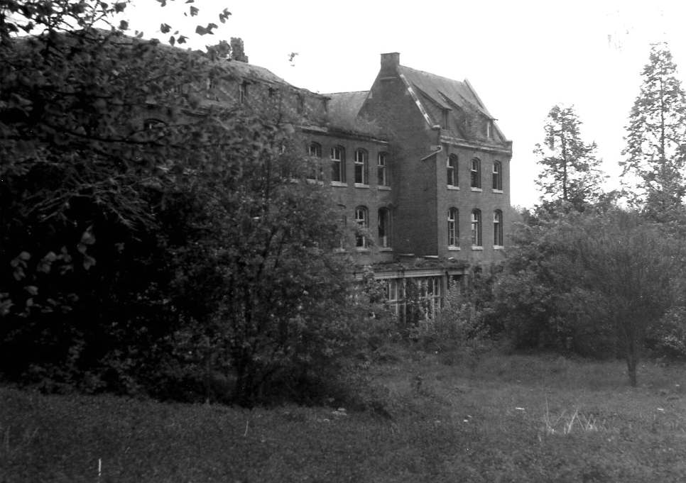 Leegstaand missieklooster te Aalbeek, vanuit de Engelse tuin